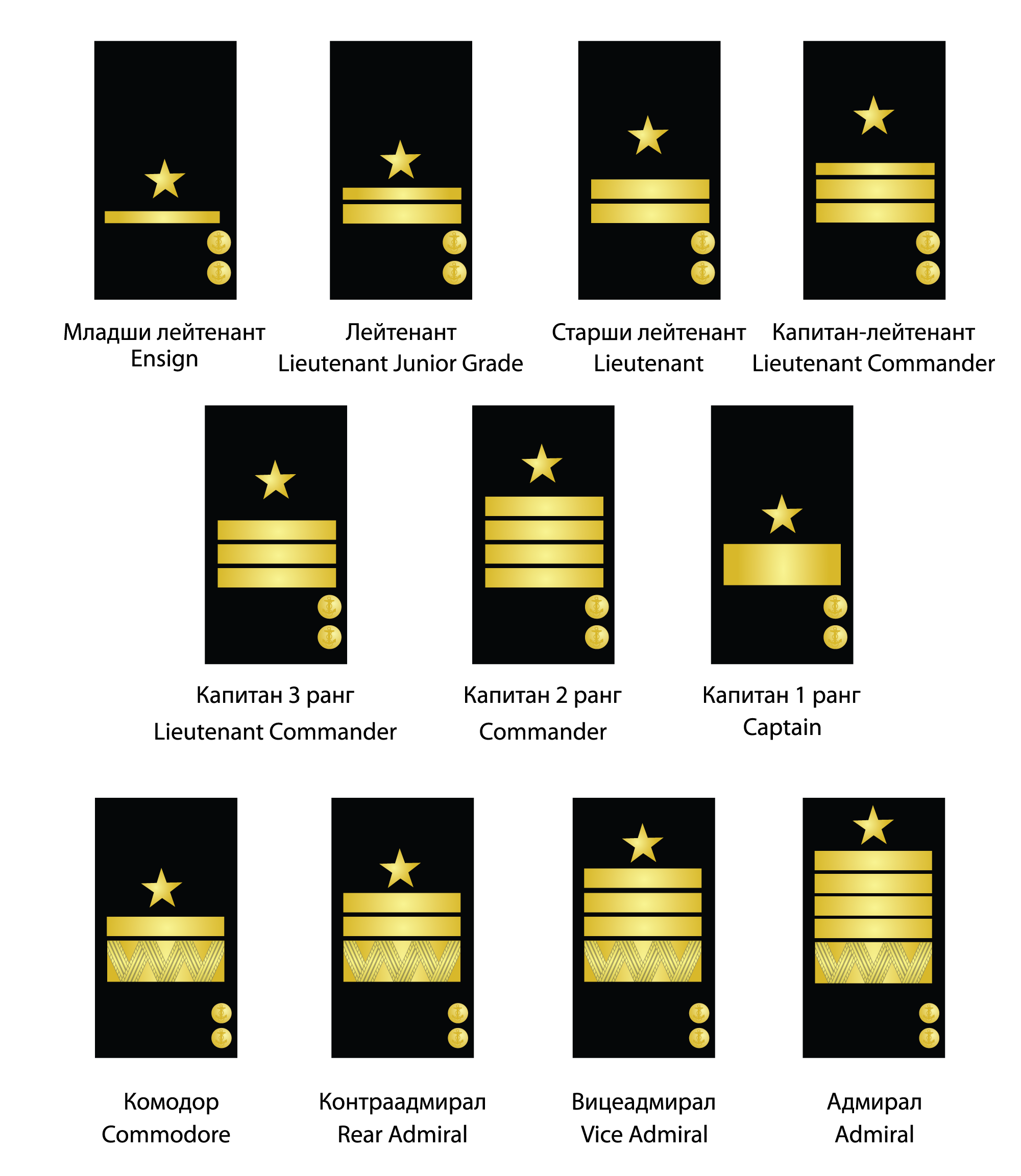 Военноморски сили на България - офицерски звания - ръкави